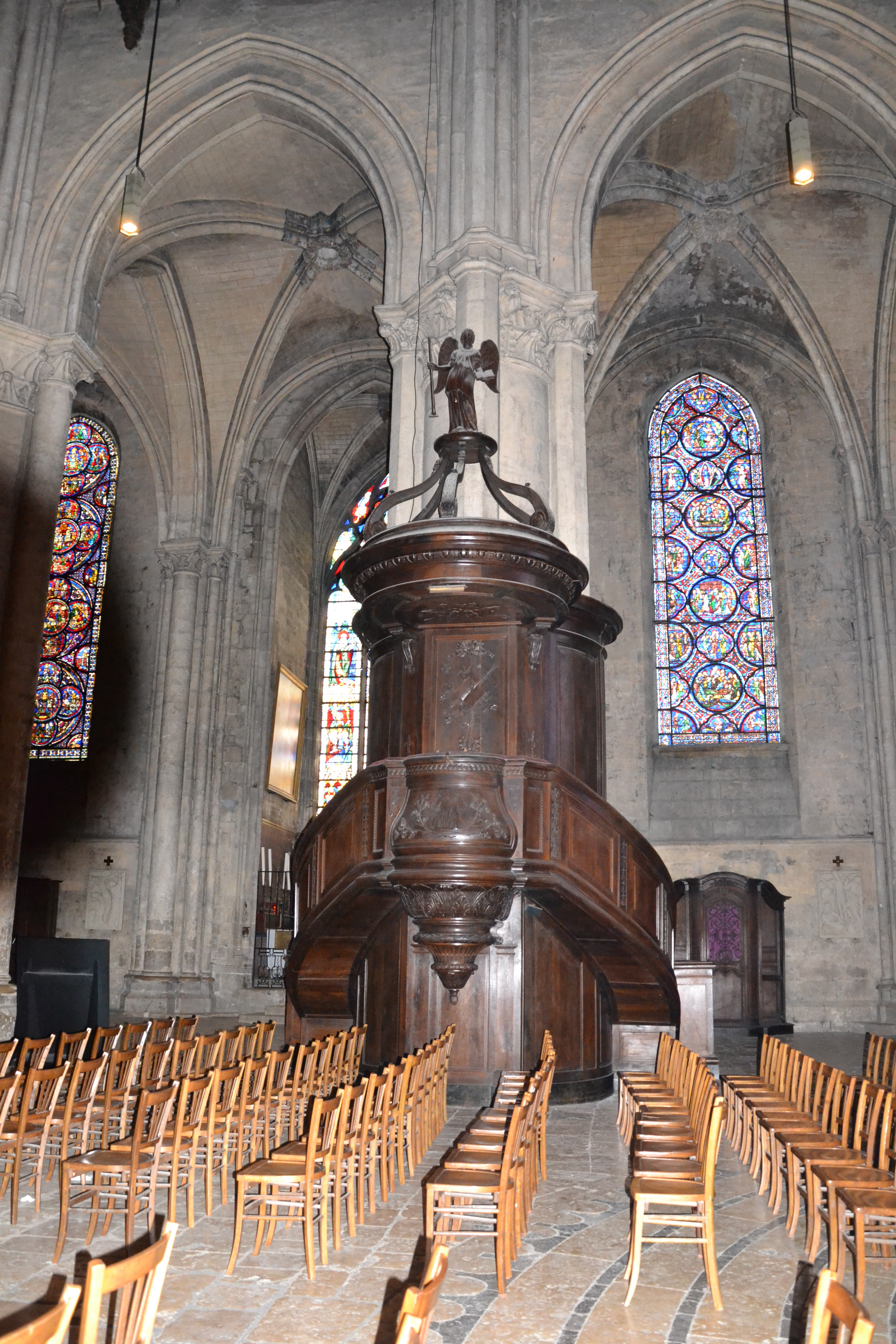 Cathédrale de Chartres (Classée, 1862), chaire à prêcher.